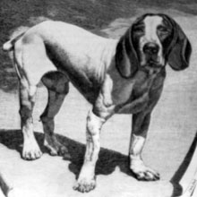 NAFAR EPER TXAKURRA. 1890. URTEAN ERAKUSKETA BATEAN ATERATAKO ARGAZKIA